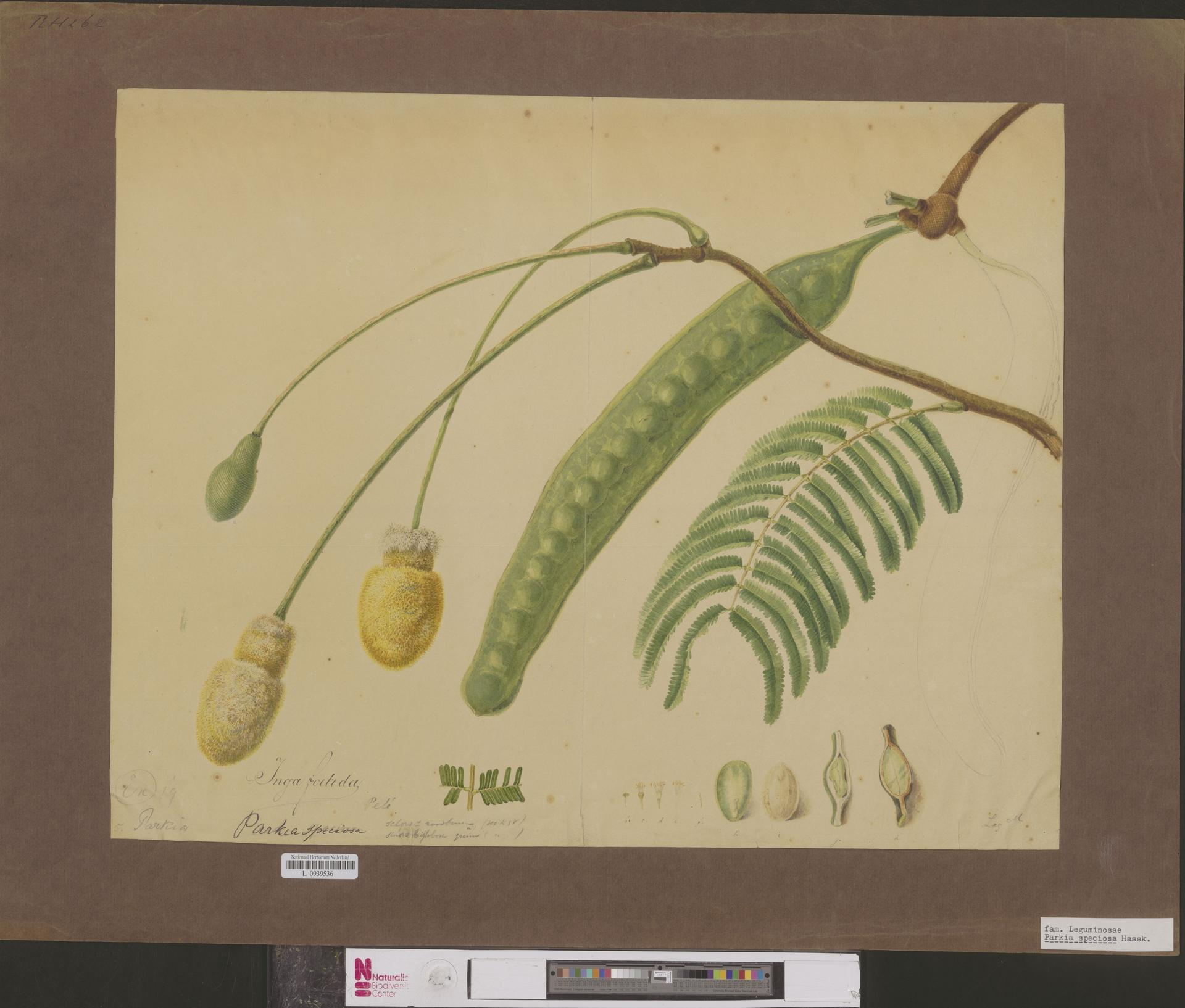 Parkiaiosa Hasskarl